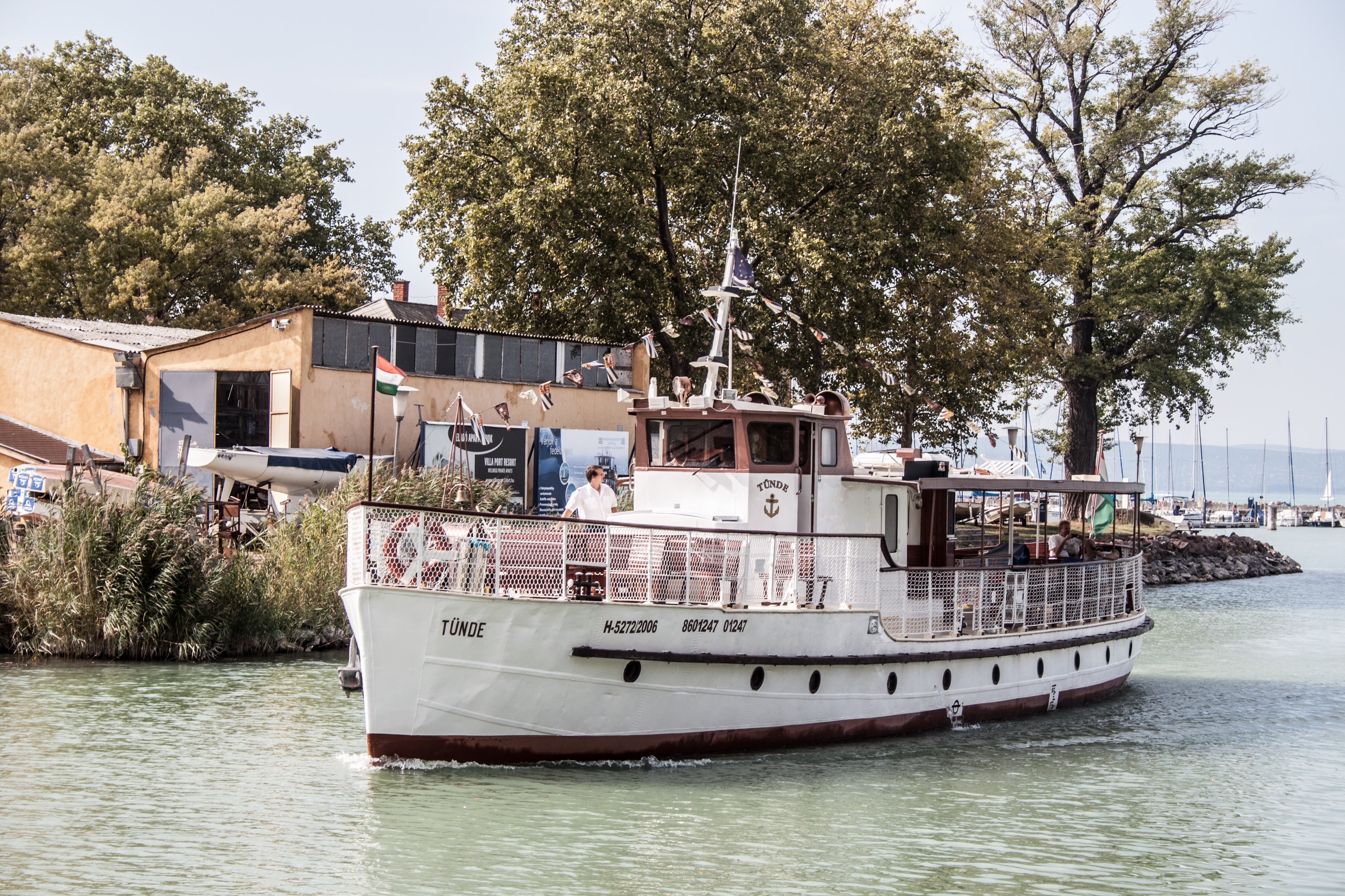 Tünde kirándulóhajó